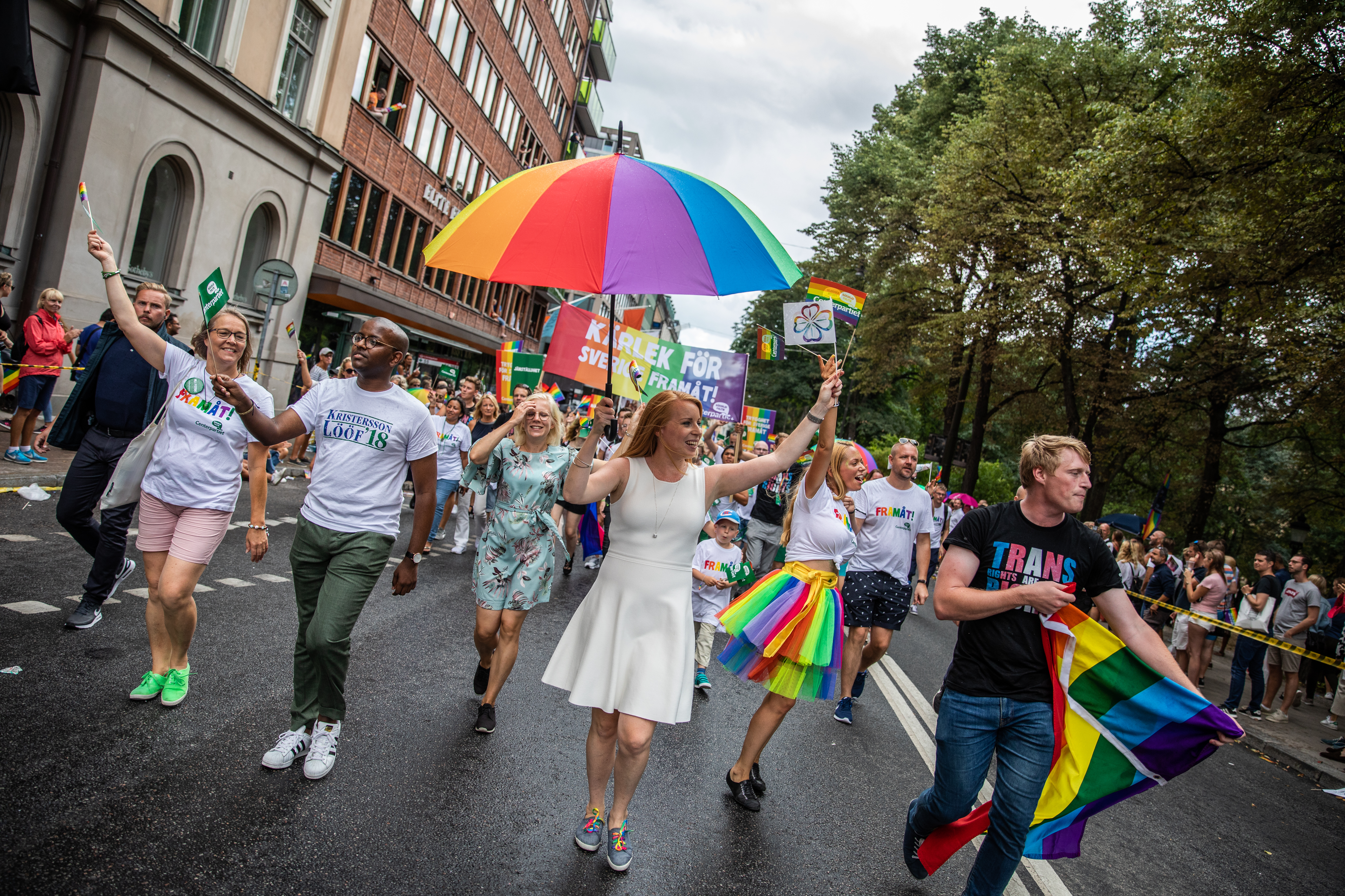 2018-08-04 Prideparaden